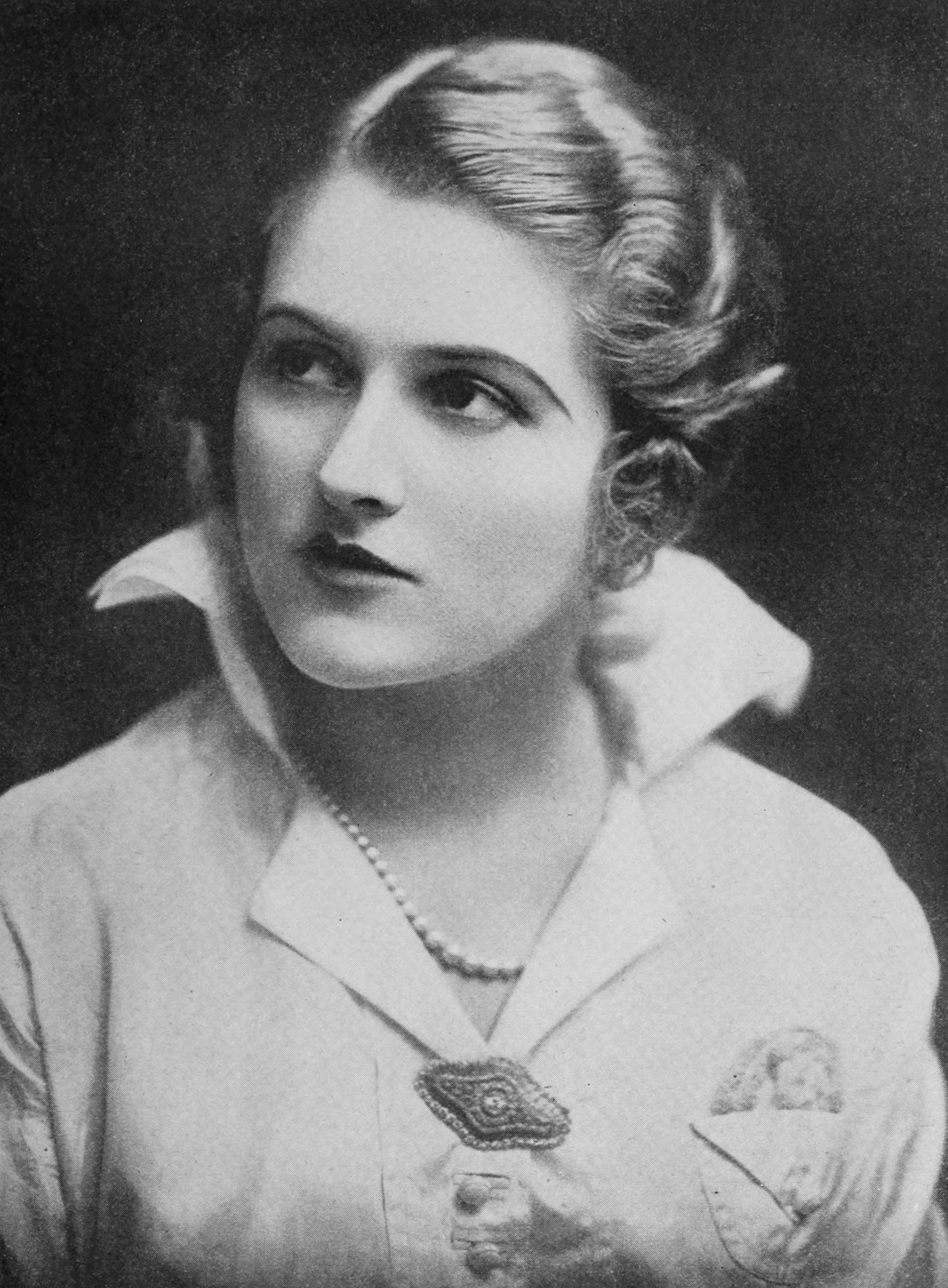 Emmy Wehlen